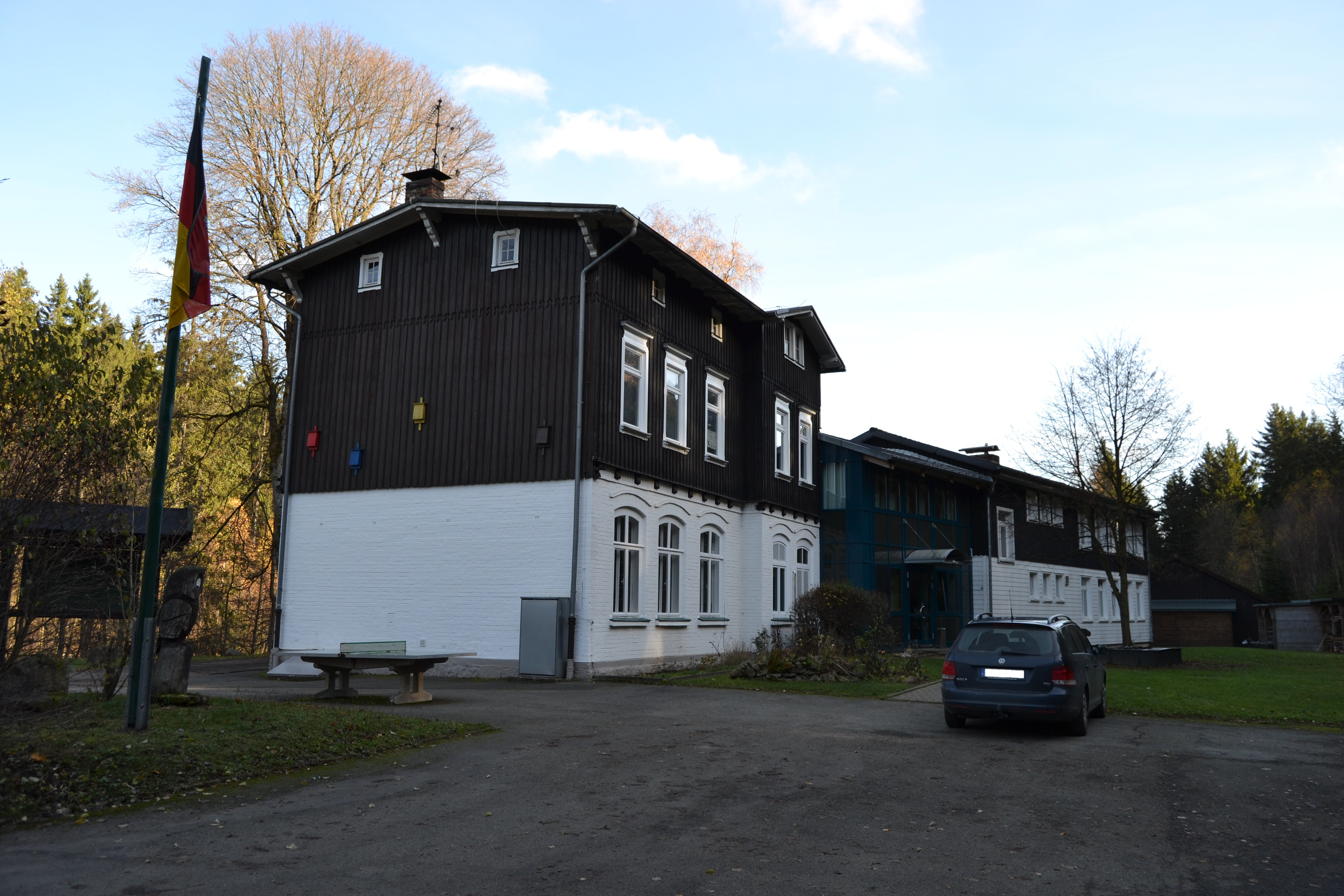 Das 1901 errichtete, nun ehemalige Empfangsgeäude des Bahnhofs Brunnenbachsmühle dient haute samt angebautem Bettentrakt (im Bild rechts) als Jugendwaldheim des Nationalparks Harz.